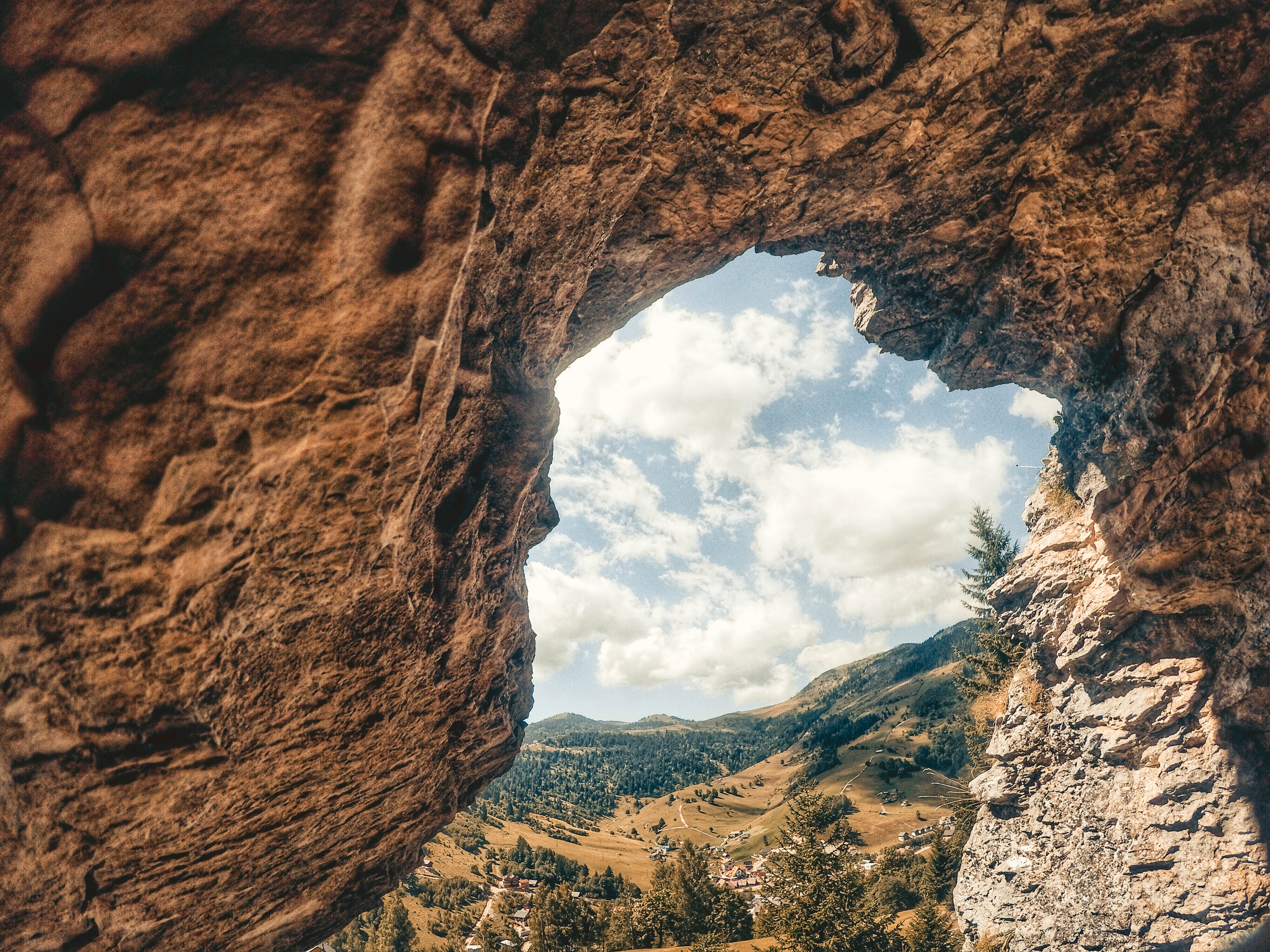 Bogë, Rugovë